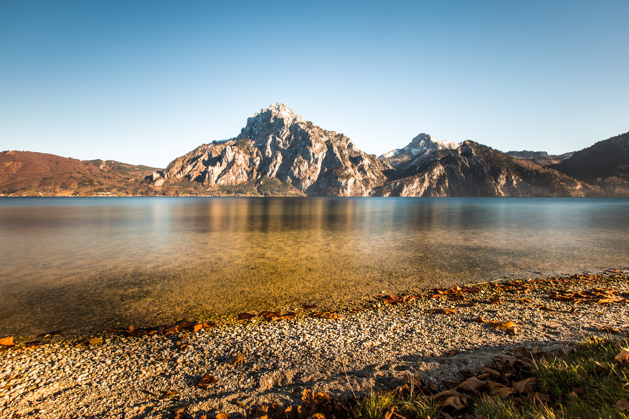 Traunstein This media shows the nature reserve in Upper Austria with the ID n148.